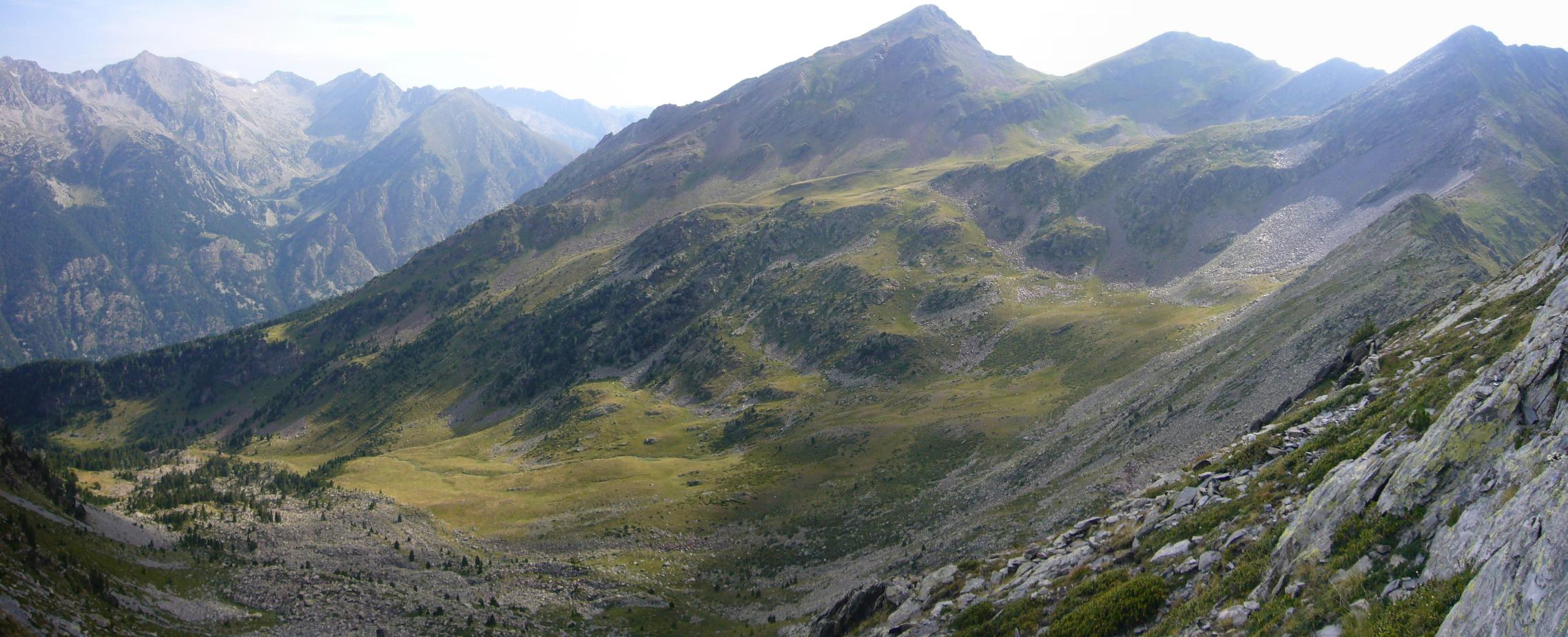 Cometes de Casesnoves vistes des del Tuc de la Comamarja; la Vall de Boí, Alta Ribagorça, Catalunya